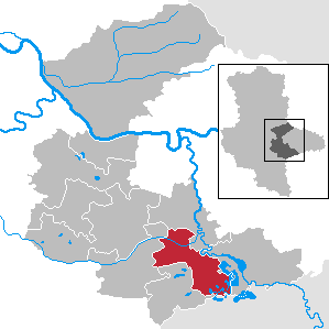 Bitterfeld-Wolfen in Sachsen-Anhalt - Landkreis Anhalt-Bitterfeld